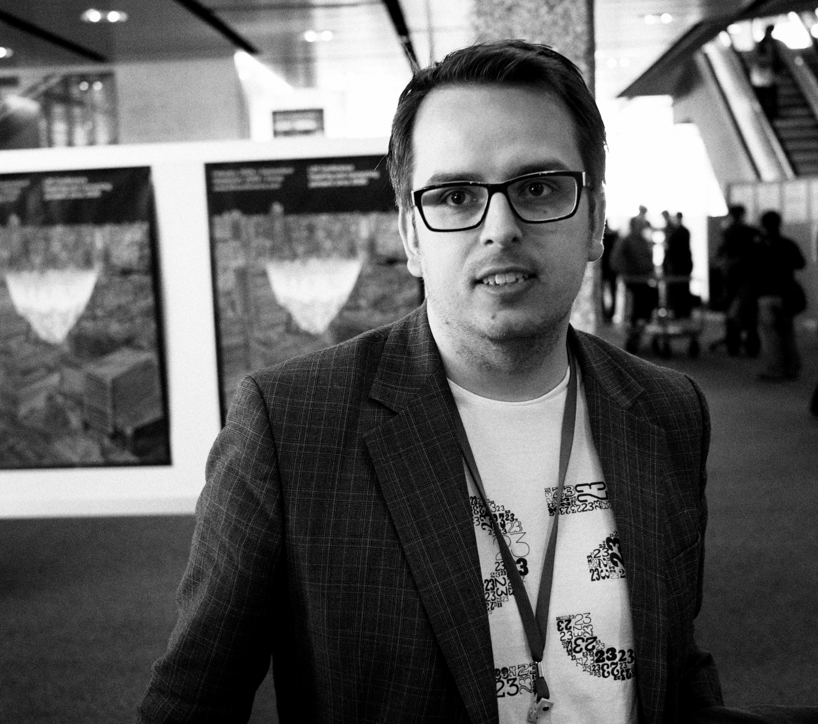 L1000706